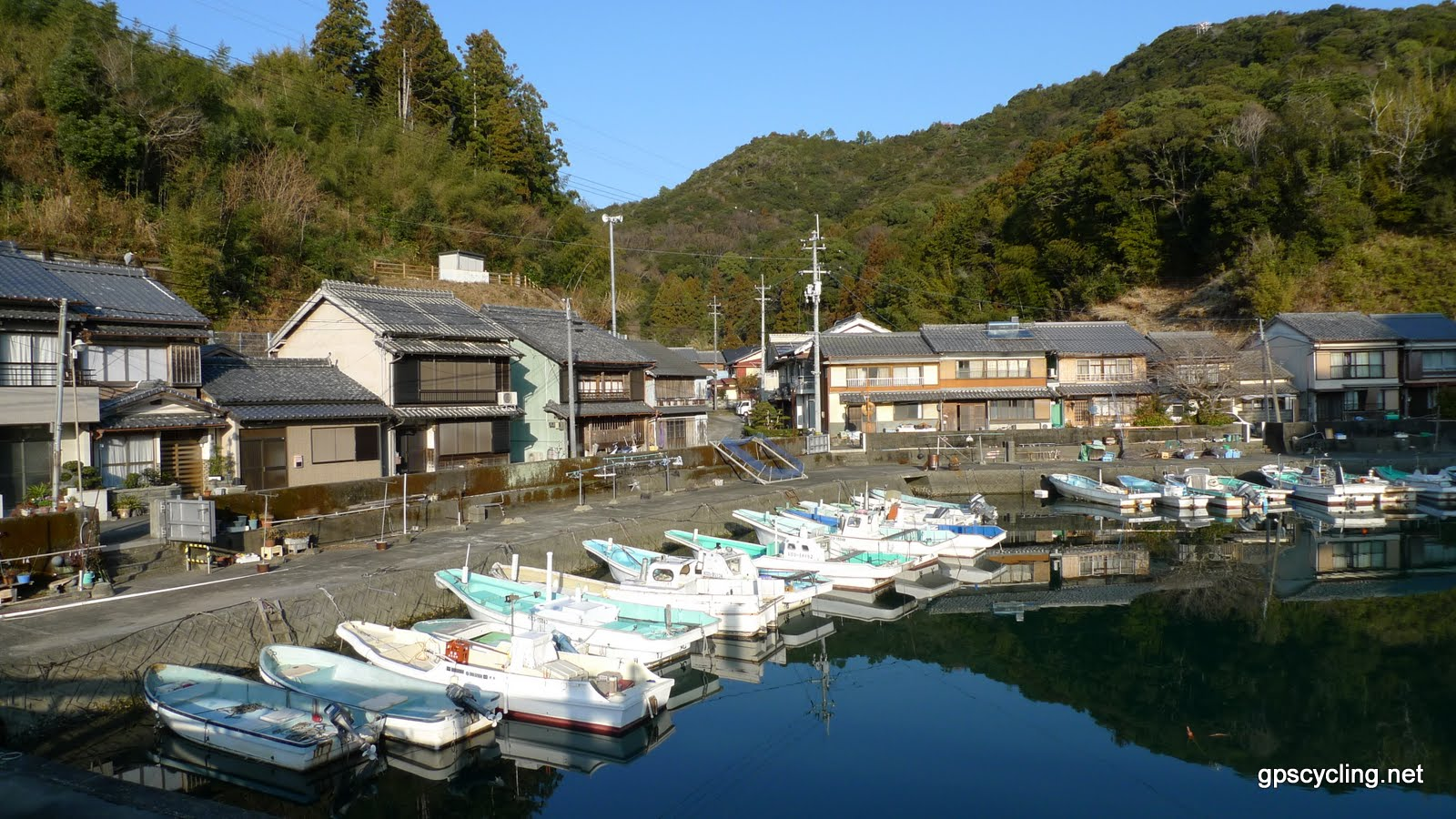 甲浦